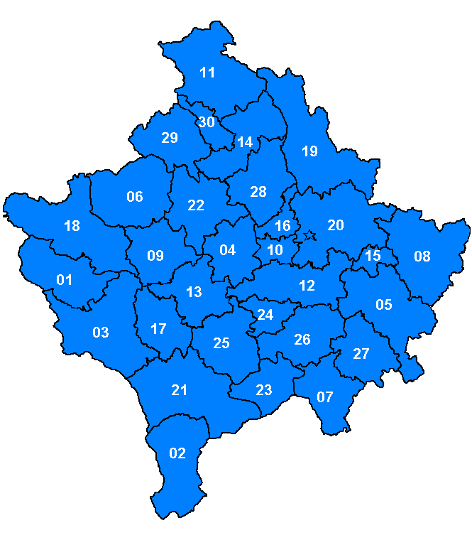 Kosovë 2006, Komunat